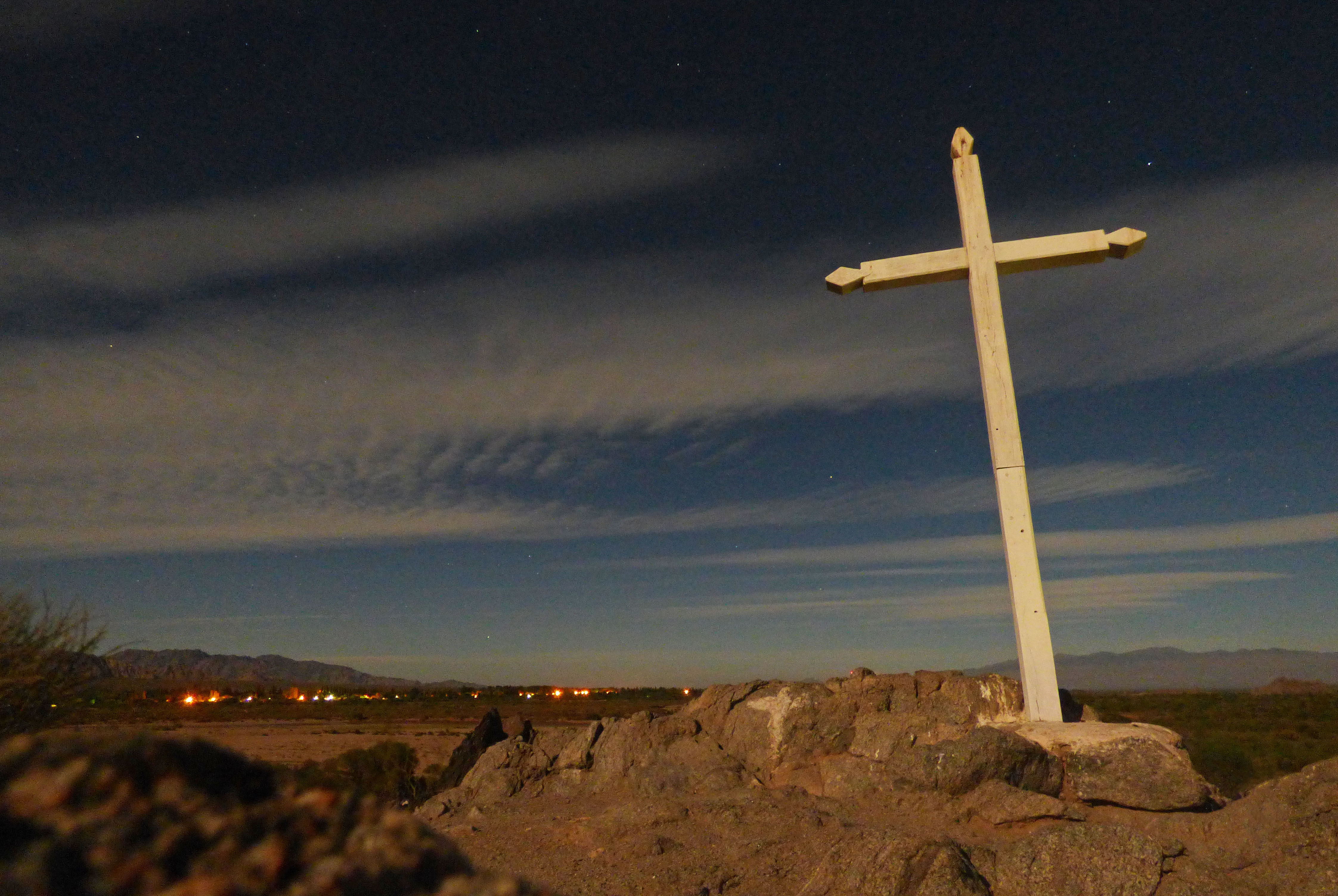 Esta cruz está ubicada en un pueblito abandonado llamado El Condado. Actualmente allí se encuentra una sola persona viviendo, está ubicado a 3km de la localidad de Villa Castelli. Dicha cruz tiene su historia ya que fue creada y colocada por los primeros habitantes del departamento, la misma esta sobre un cerro junto a una de las primeras iglesias que existió en la localidad, donde allí se celebraban las primeras fiestas patronales que aún se siguen celebrando.